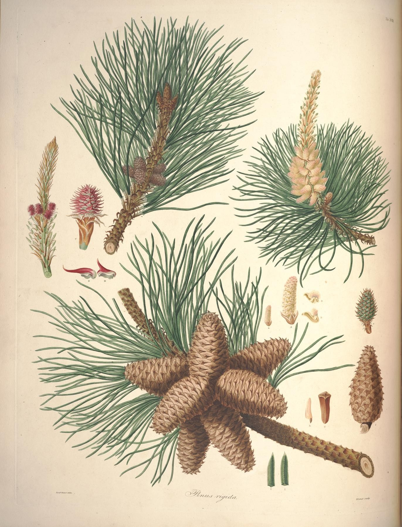 ■■ . ■-. / \ i ' Tci'tiBaiicr deiin . , Warnja- -r .f s